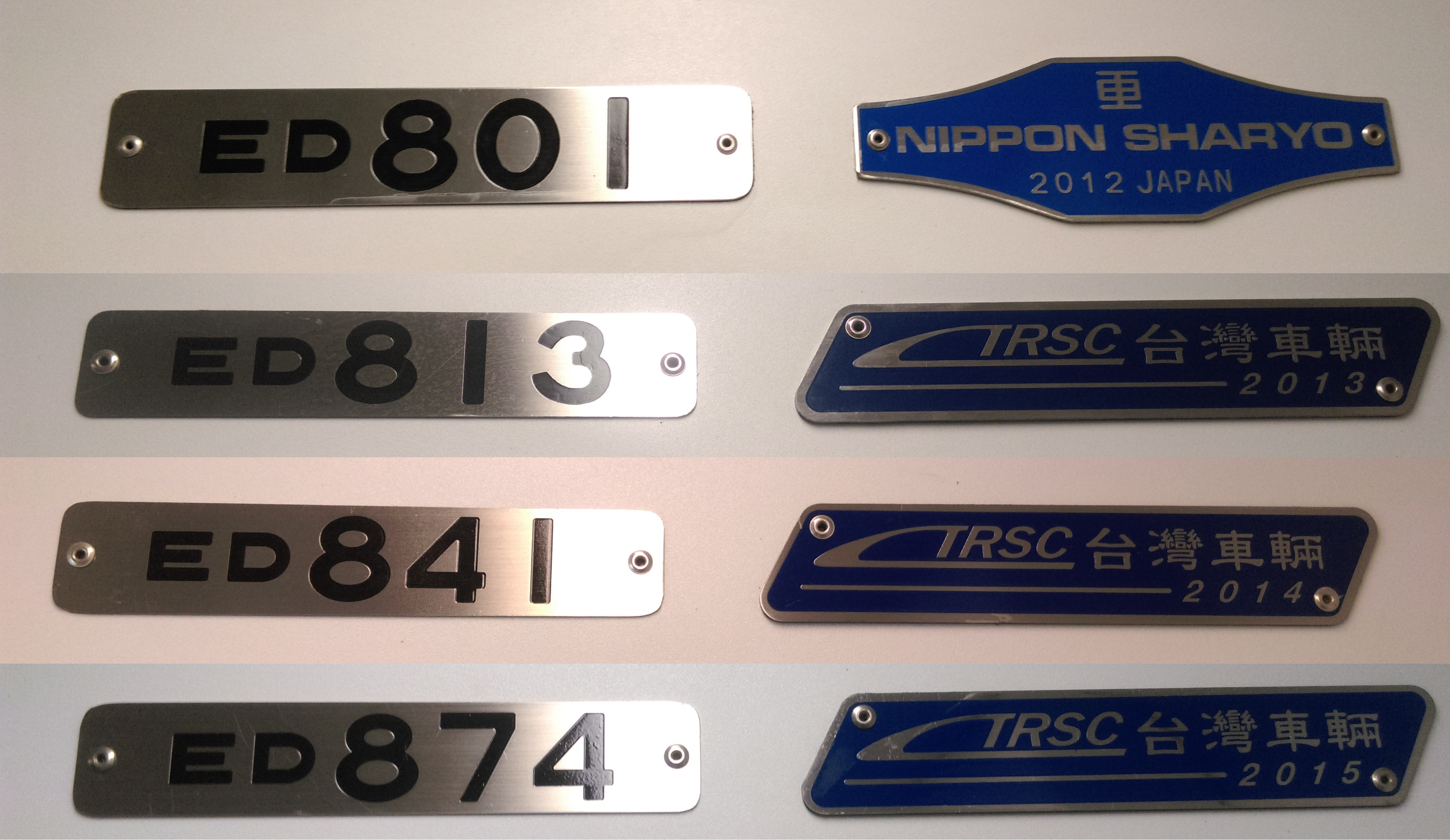 EMU800車內原廠銘版 (第一圖(2012):EMU801~804 第二圖(2013):EMU805~820 第三圖(2014):EMU821~860 第四圖(2015):EMU861~874)